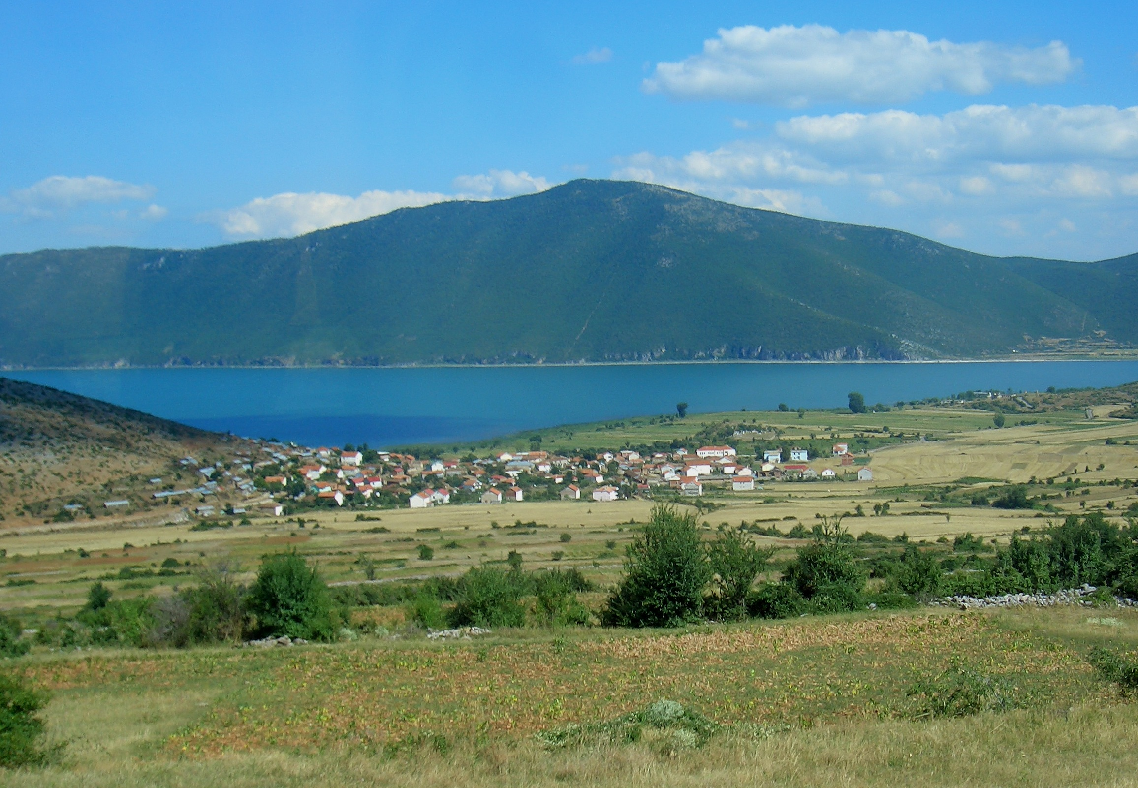 Liqenas (maz. Pustec) albanisches Dorf am Prespasee, Zentrum des Siedlungsgebiets der mazedonischen Minderheit in Albanien